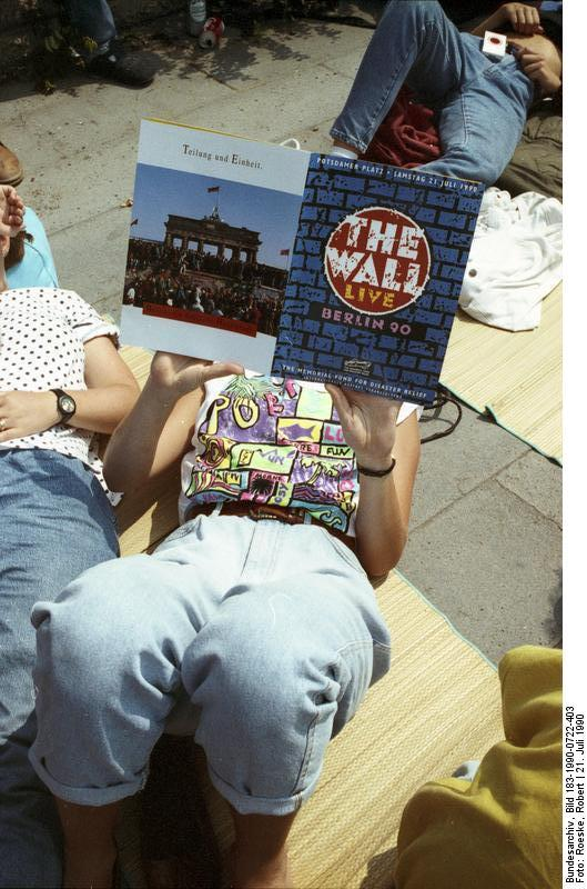 Berlin, Aufführung der Rockoper "The Wall" BER-403 KB/22.7.90/Berlin: Rockspektakel "The Wall"/ Die Sonne machte es möglich: schon Stunden vor Beginn der gigantischen Rock-Show am Potsdamer Platz (Nacht vom 21. zum 22.7.) belagerten junge Besucher das Areal zwischen Brandenburger Tor und Leipziger Platz. [Berlin, Potsdamer Platz.- Rockoper "The Wall", wartende Besucher mit Programmheft]